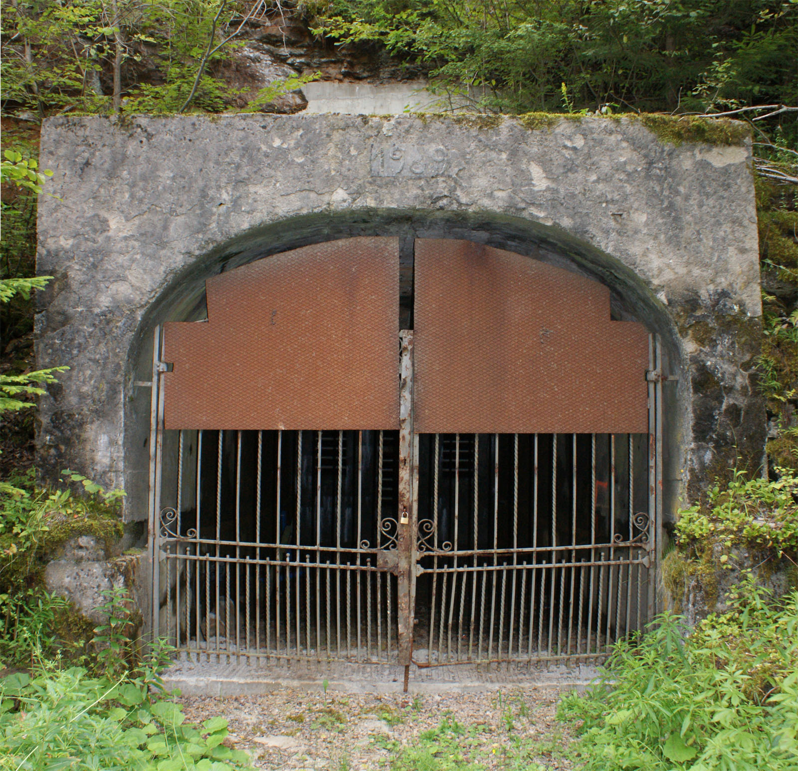 Agank vum Tunnel fir op Esch-Uelzecht. Laangegronn, Rëmeleng. September 2010